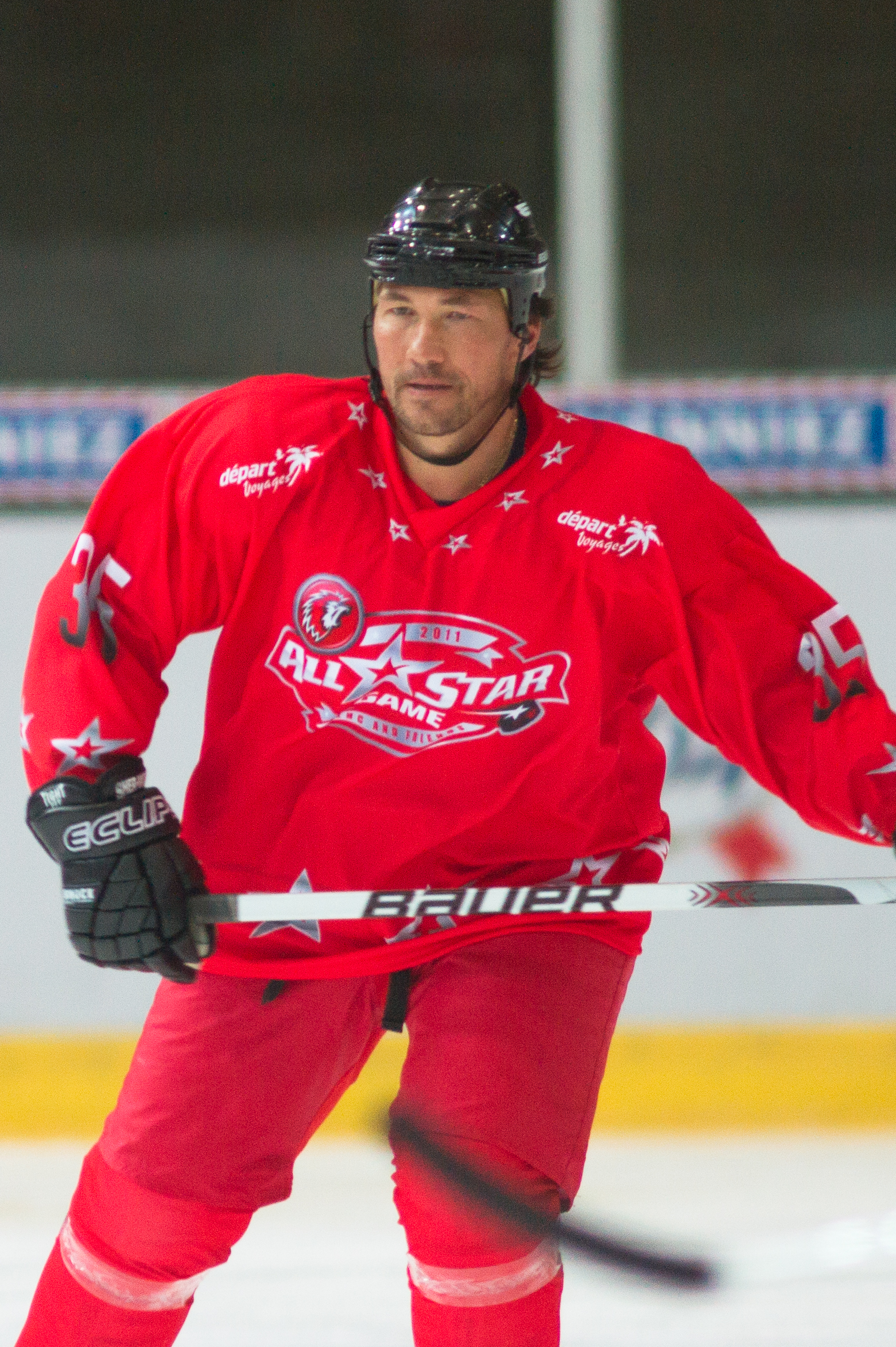 Andreï Bachkirov à Lausanne en 2011.